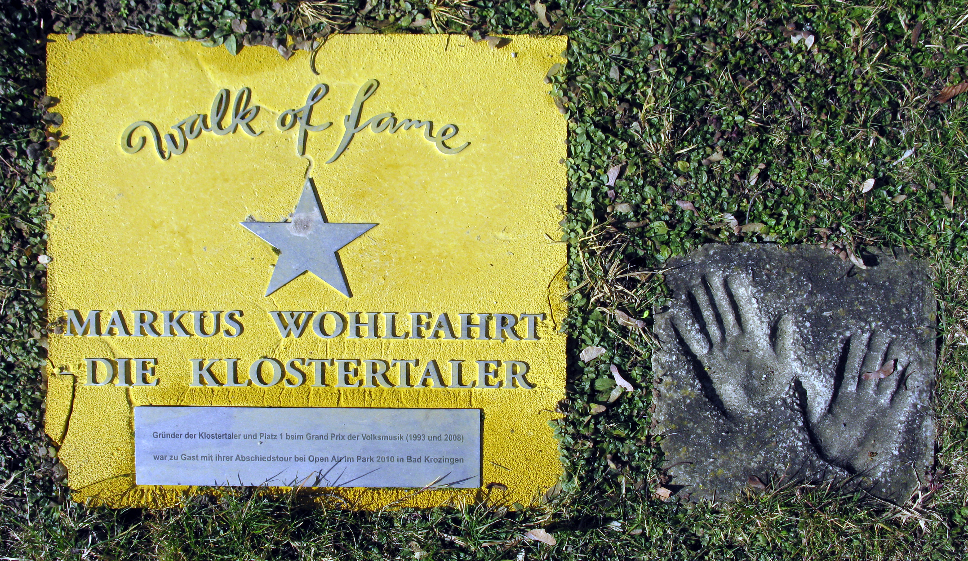 Markus Wohlfahrt und die Klostertaler auf dem Walk of fame im Kurpark von Bad Krozingen